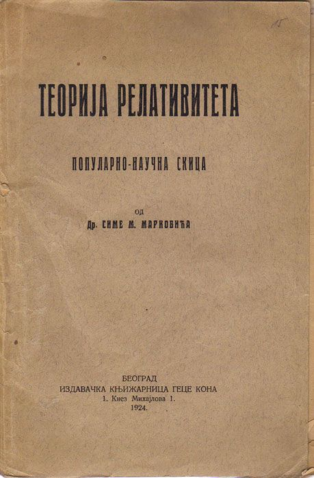 Srpskohrvatski / српскохрватски: Teorija relativiteta - Dr Sima M. Marković